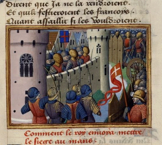 Le siège du Mans, par Martial d'Auvergne, enluminure issue de l'ouvrage Vigiles de Charles VII, Paris, France, XV°siècle.